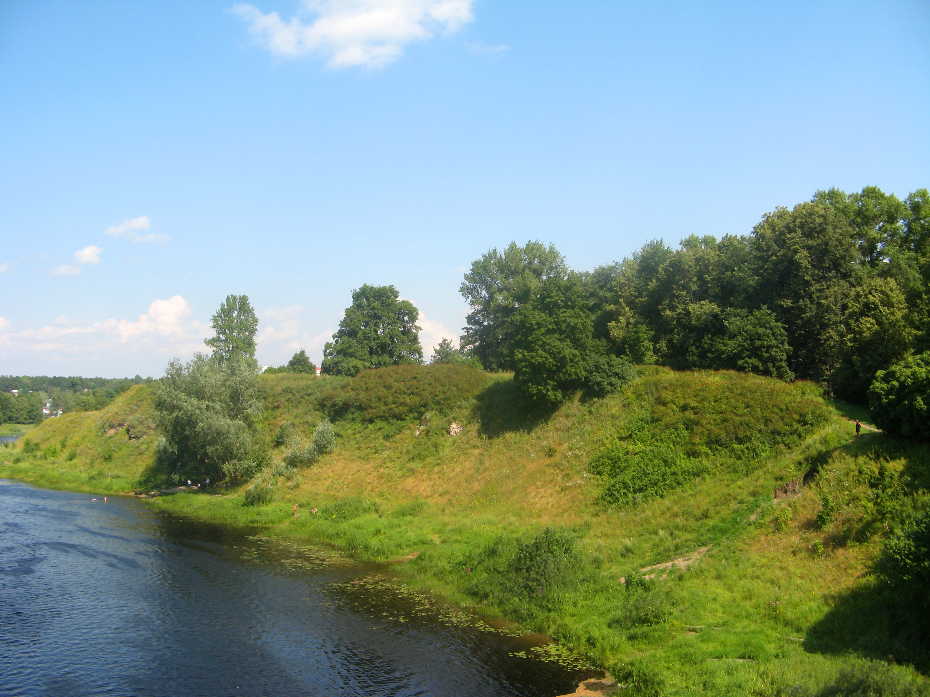 Валы: проспект Карла Маркса, 1Б (парк Летний сад), Кингисепп, Ленинградская область